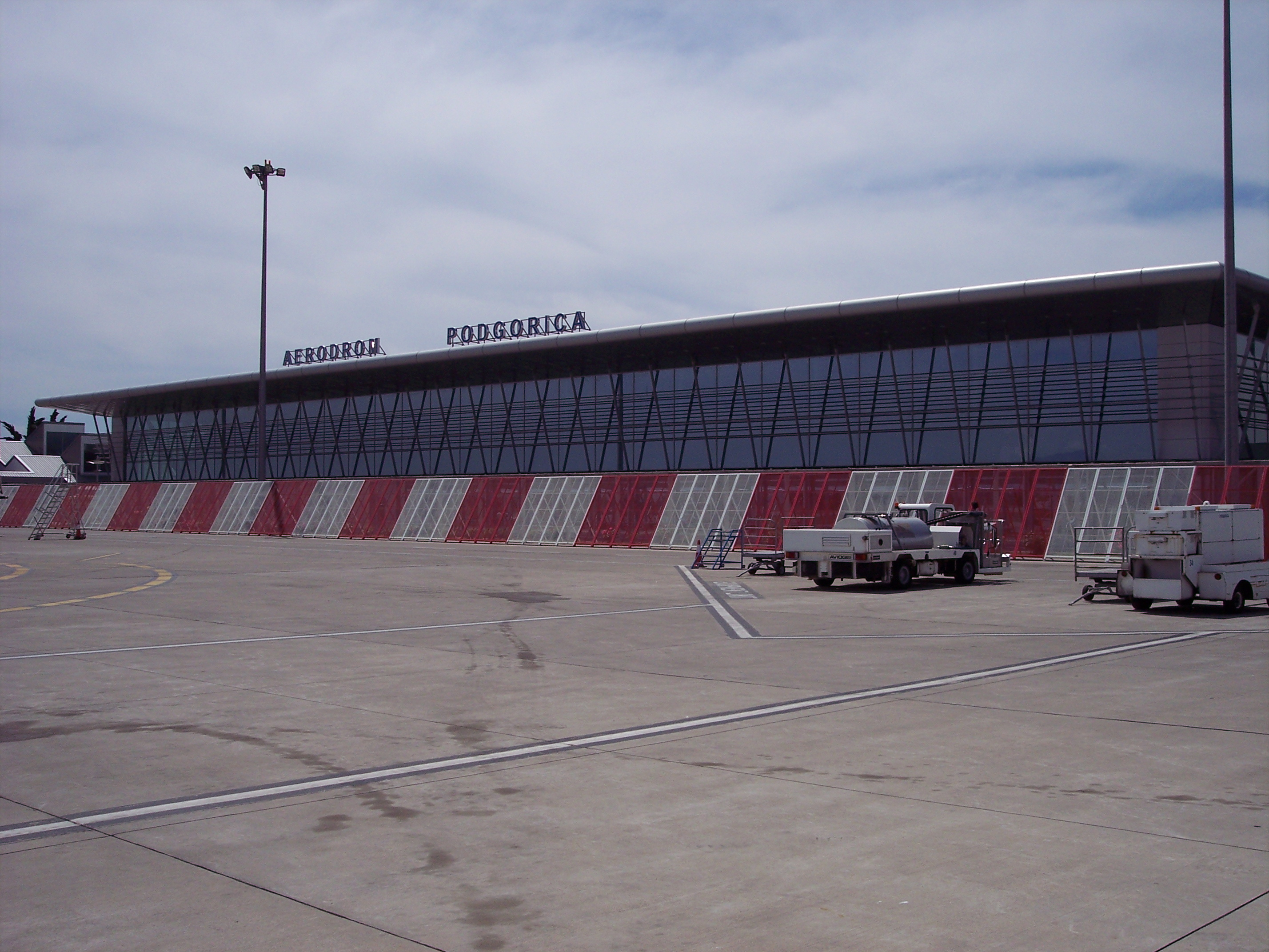 PODGORICA TERMINAL